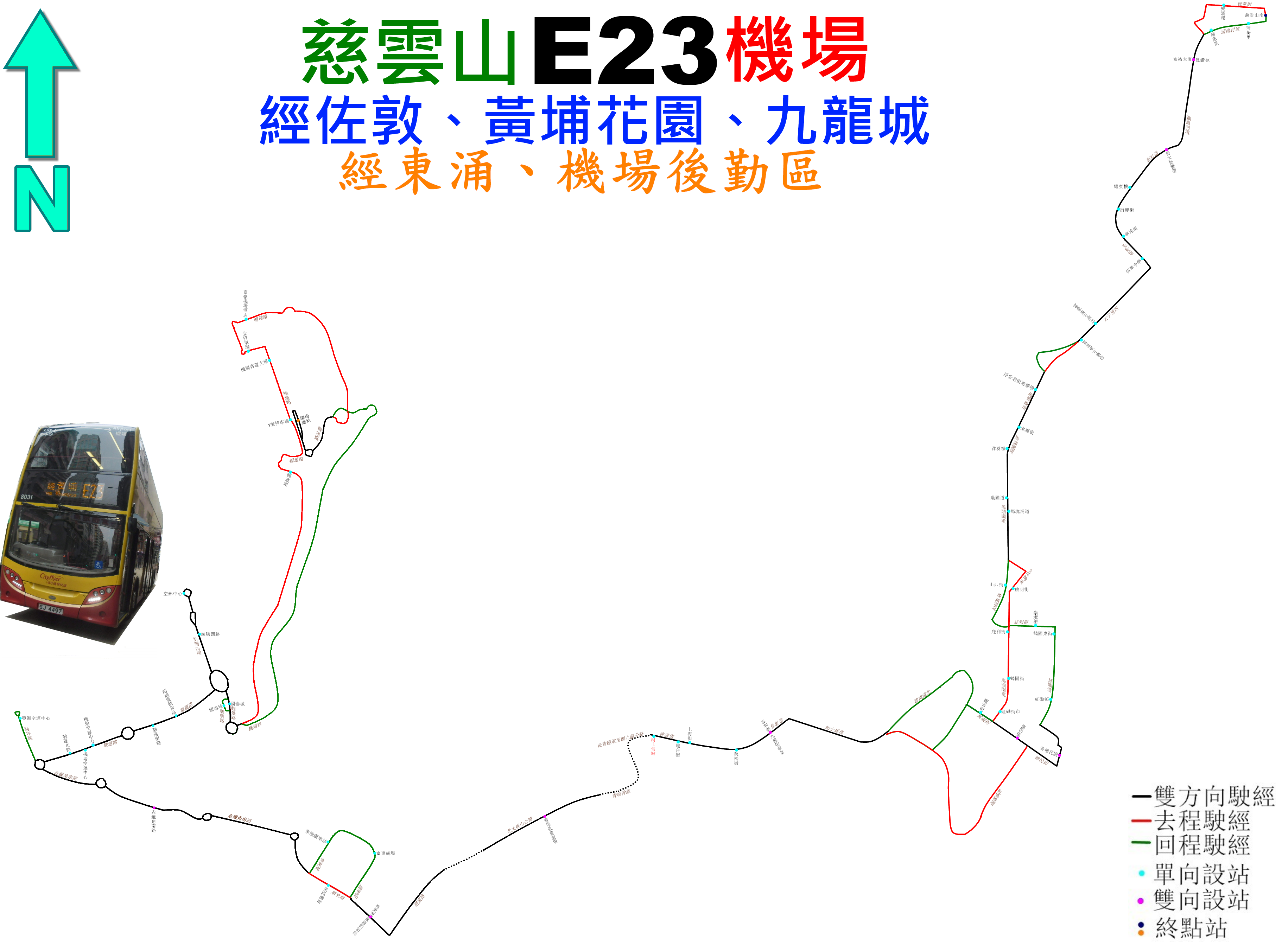 中文（香港）: 城巴E23線的走線圖